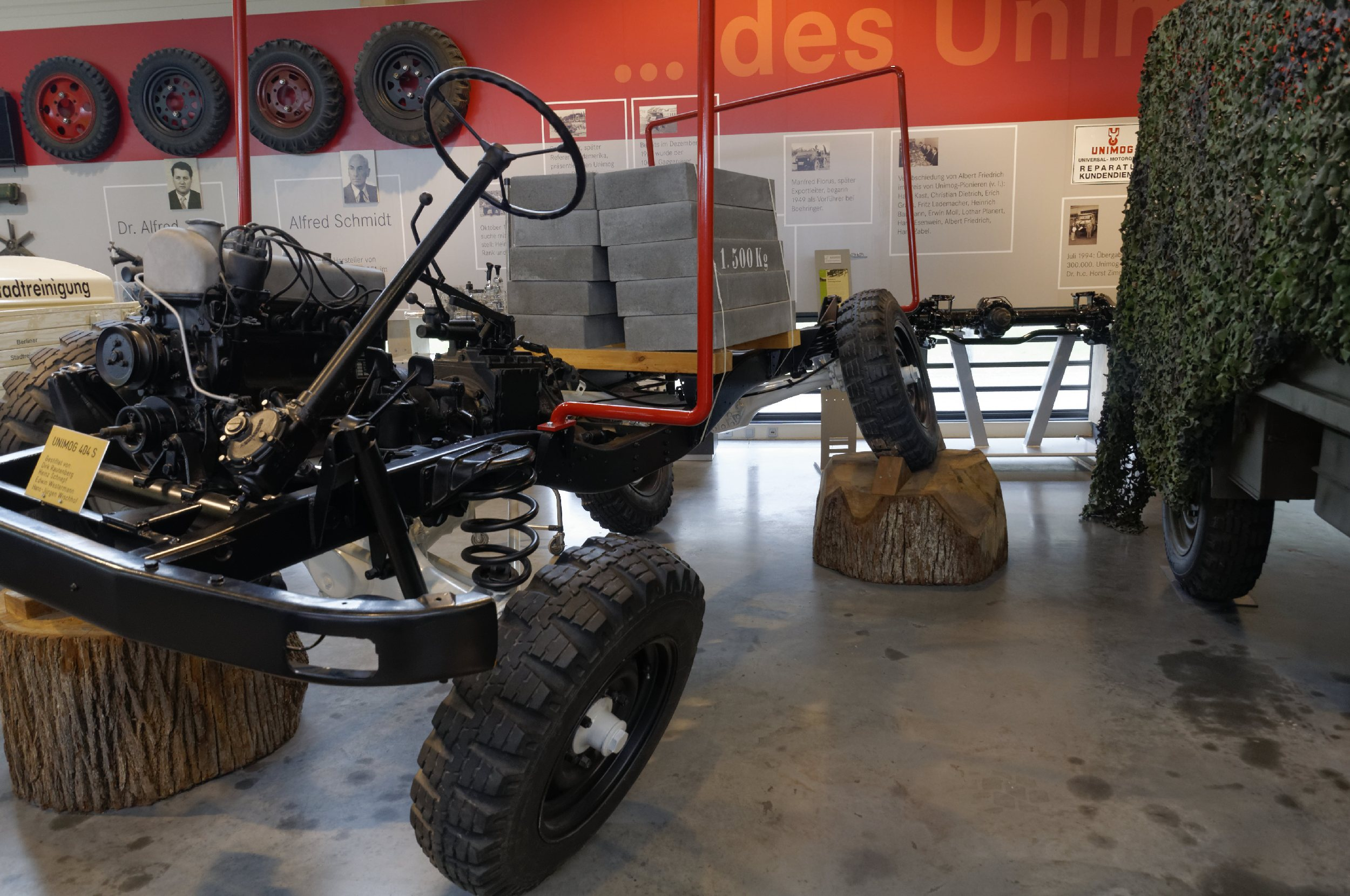 Gaggenau -Unimog-Museum